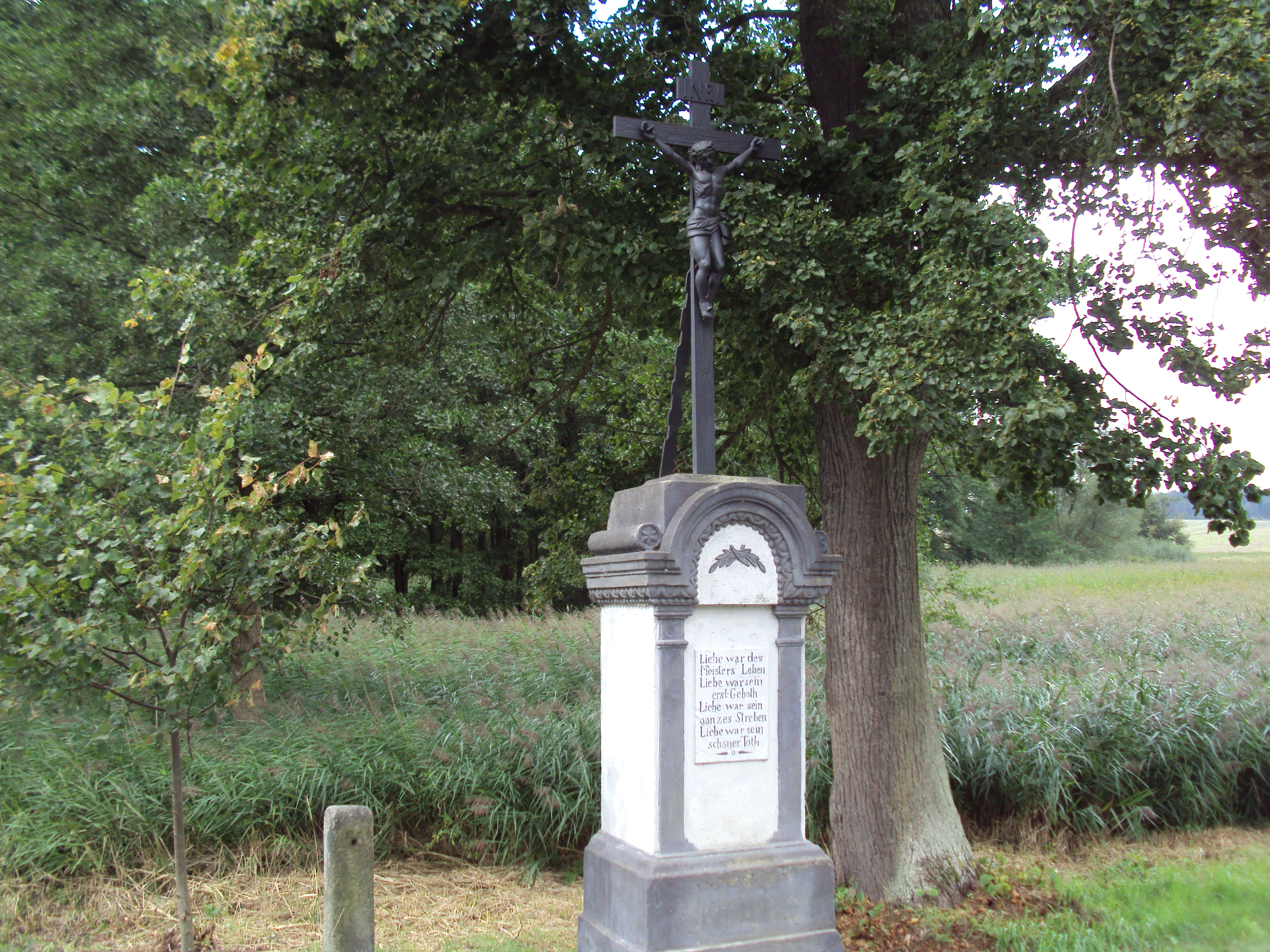 Křížek v Radvanci u silnice směr Sloup v Čechách